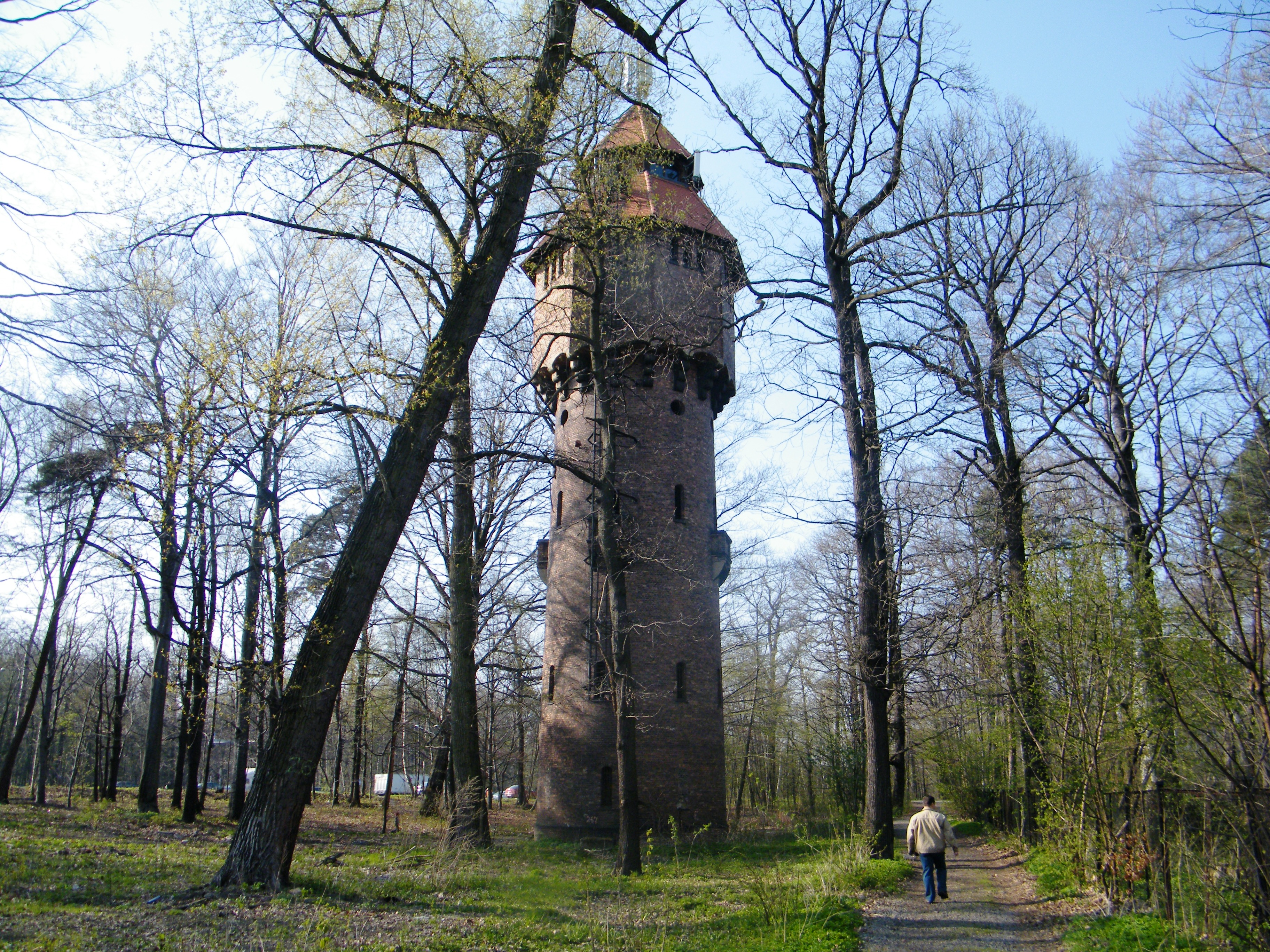 Wieża Ciśnień.